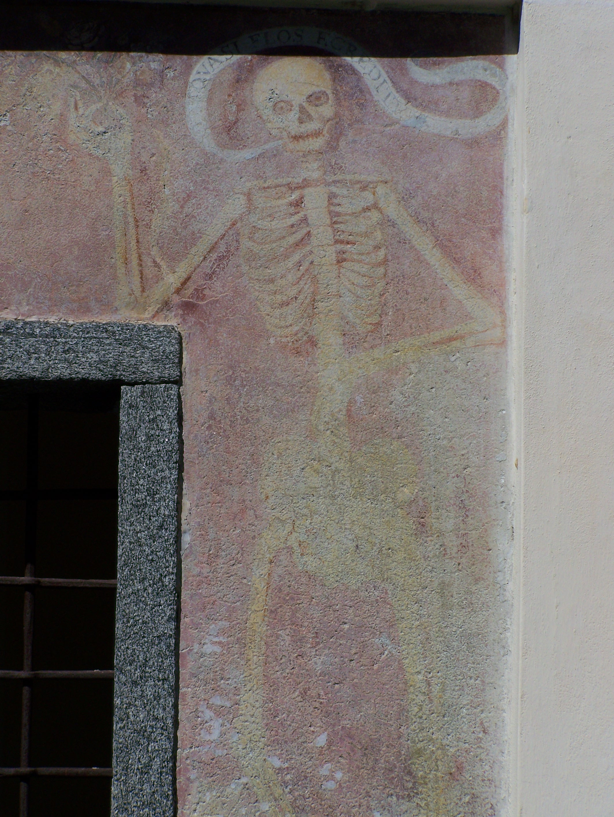 Particolare dell'affresco nell'ossario quattrocentesco di fronte alla chiesa di San Michele di Cercino (SO) - Italy